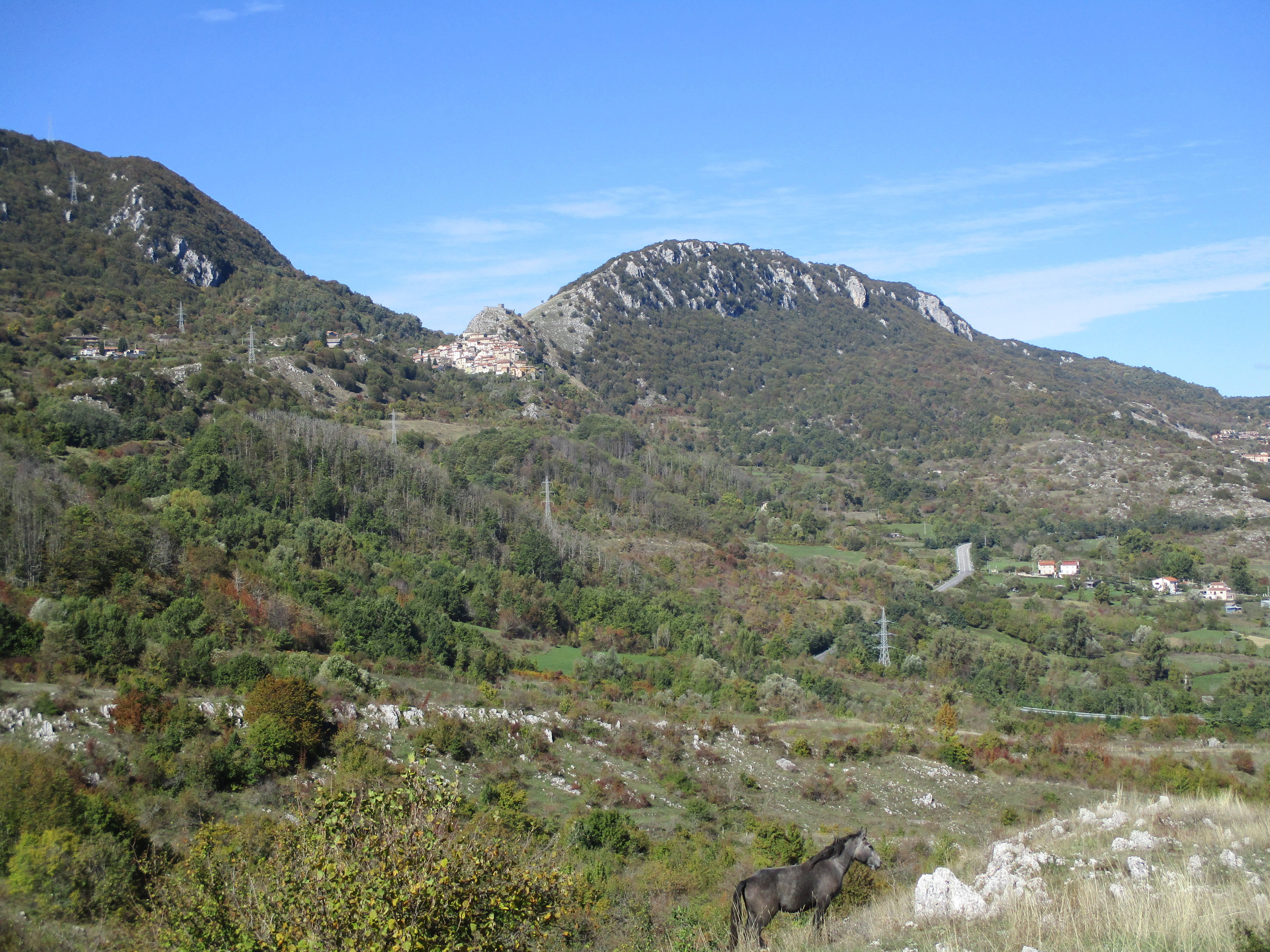 Panoramica di Tremonti